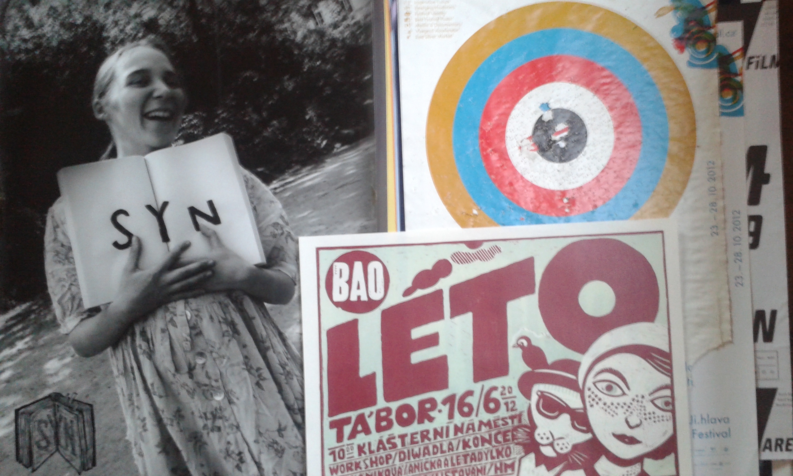 různé